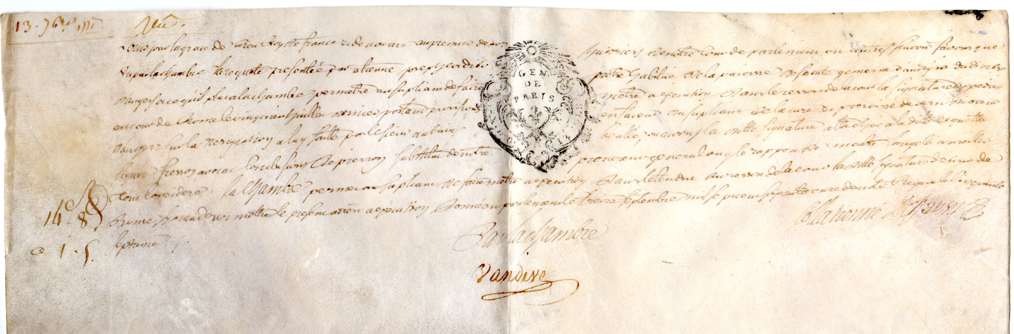 Parchemint de 1771, signé Nicolas Félix Vandive Greffier au Grand Conseil, conseiller Notaire Secrétaire Maison et couronne de France